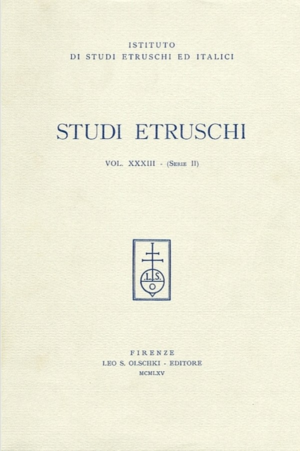 Studi_Etruschi. Vol. 33_(Serie_II),_Firenze,_Leo S. Olschki_1965